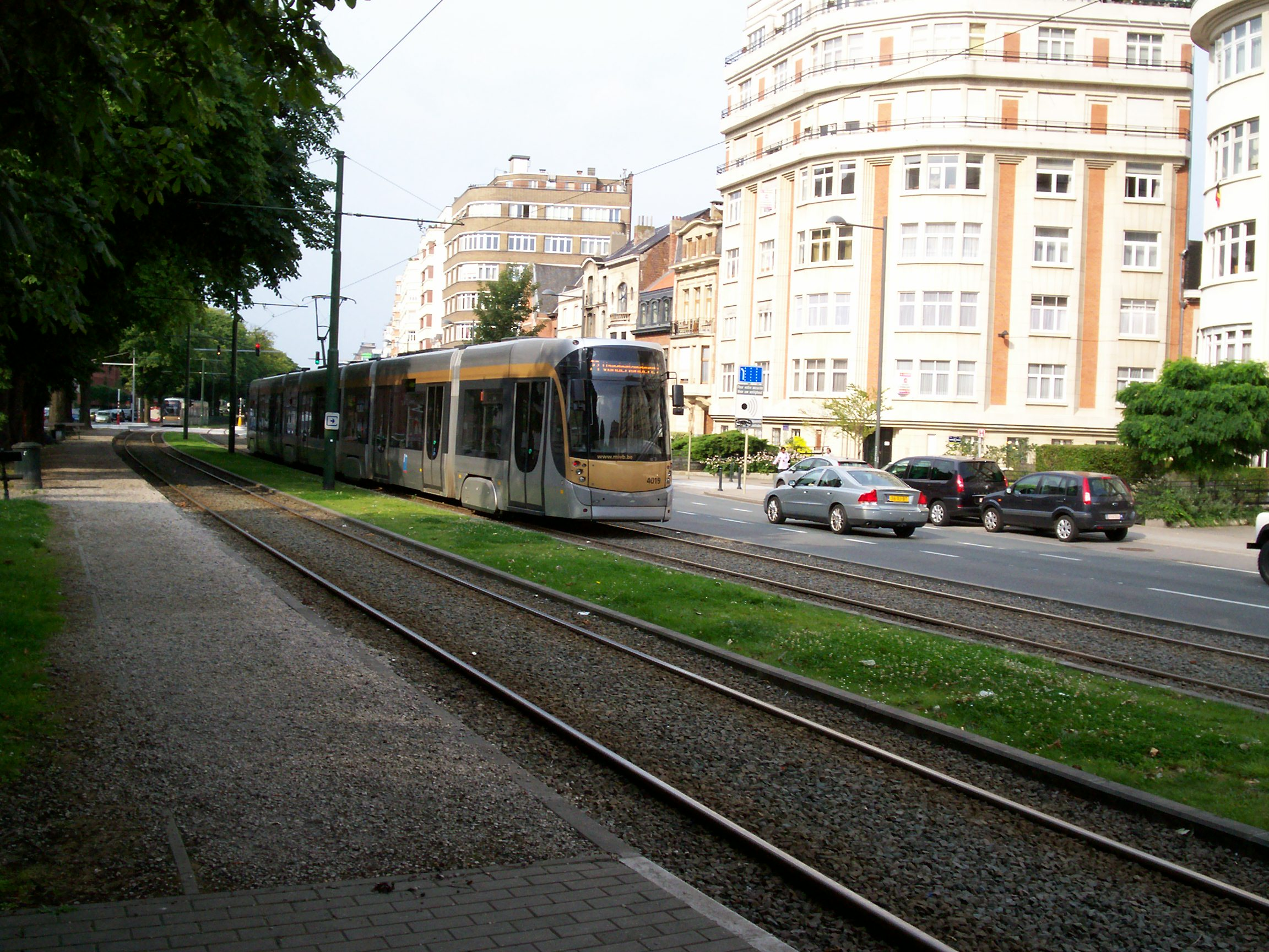 Tramvaj typu T 4000 na lince 23 ve směru Vanderkindere, Brusel, Belgie